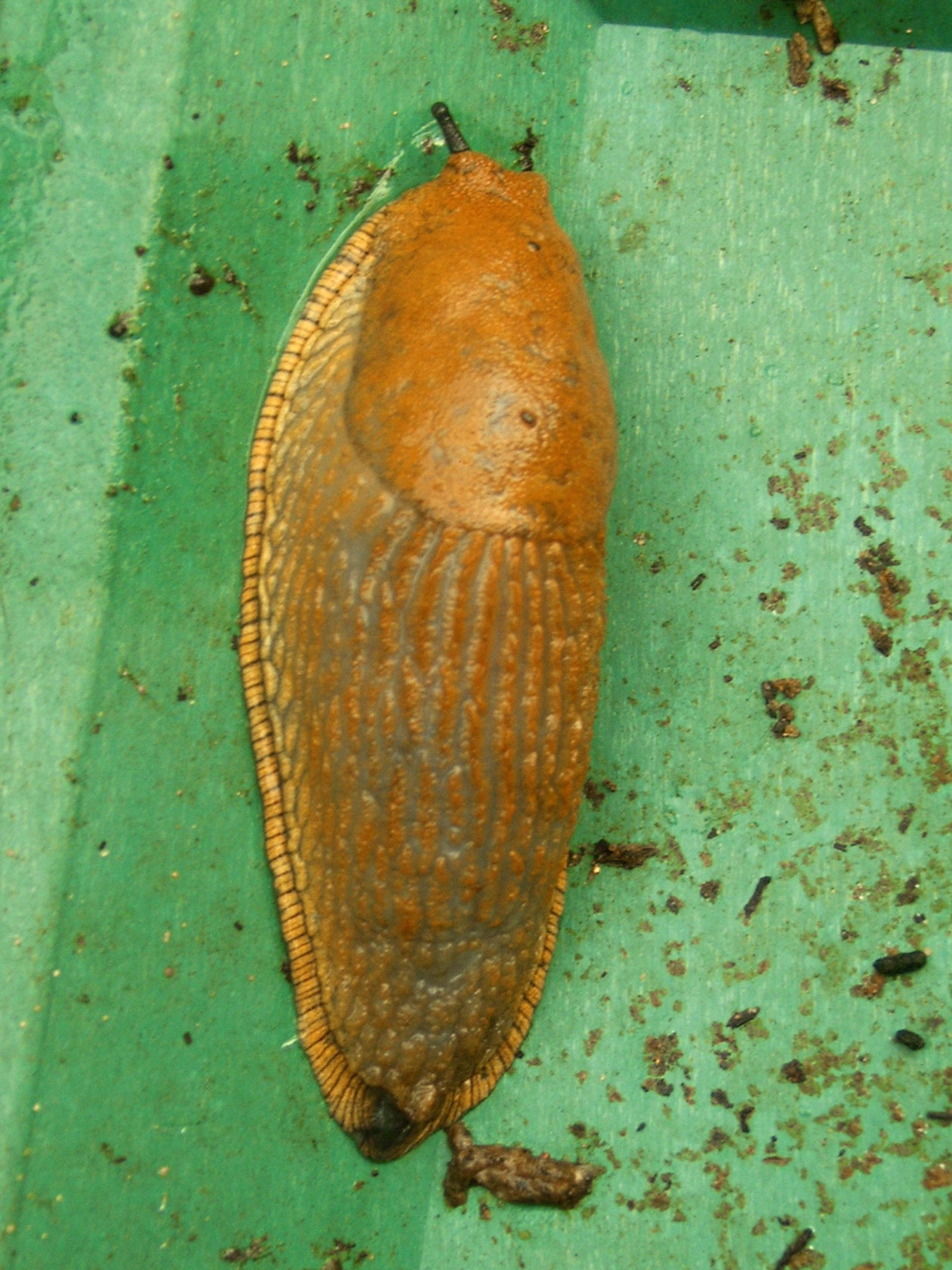 Adultform von Arion vulgaris an Innenseite des Deckels eines Schnellkomposters.